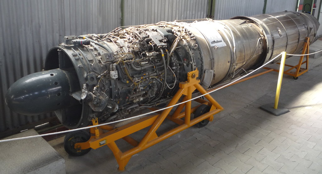 Réacteur SNECMA ATAR 101-G3 du Super Mystère B2